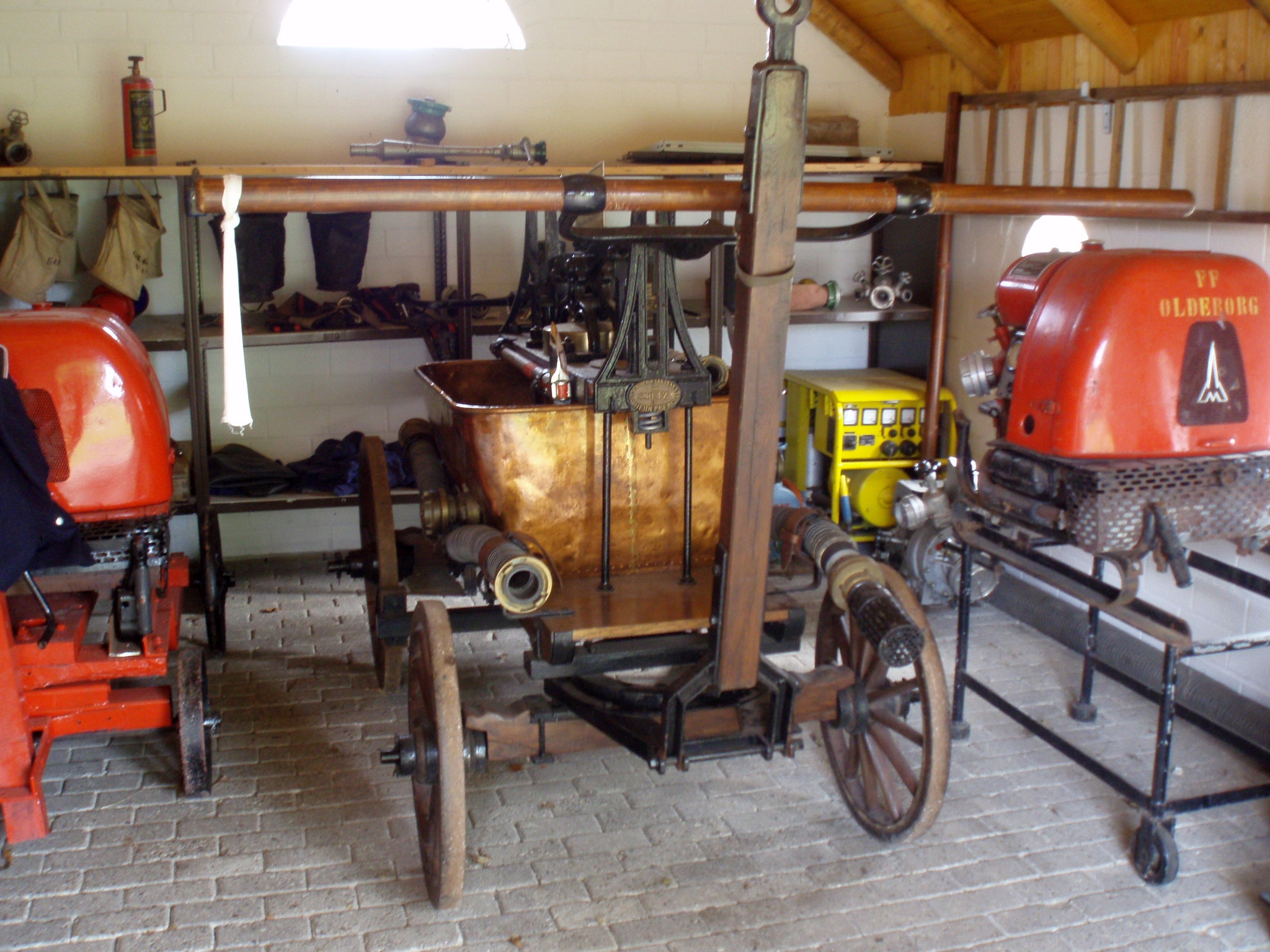 Alte Löschtechnik im Spritzenhaus. Das Foto wurde aufgenommen im Dorfmuseum Münkeboe